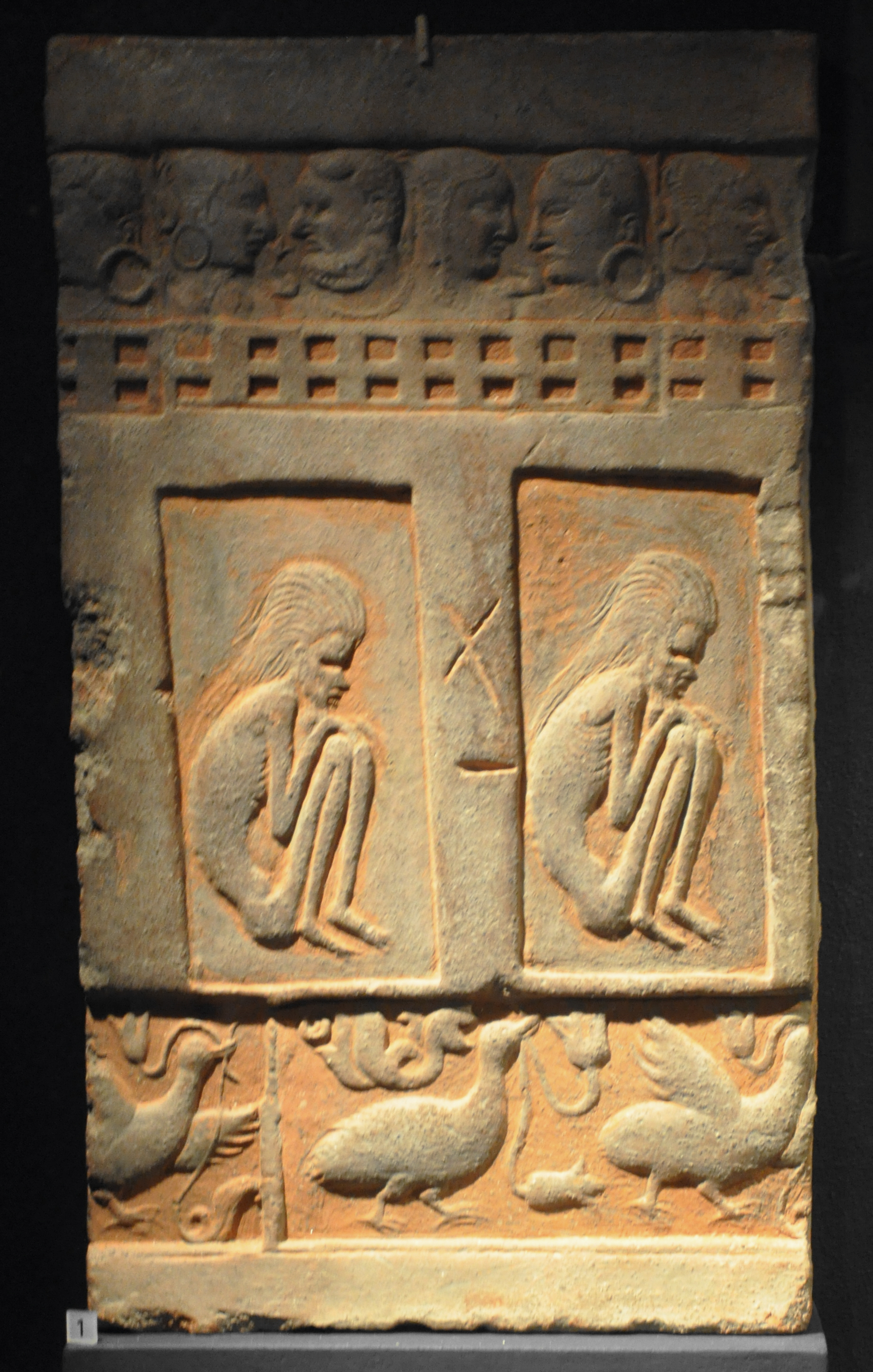 Wandpaneel mit Asketendarstellungen; Ziegelrelief mit seriell eingepressen Motiven aus eiem Klosterhof nahe Srinagar; in der Mitte eingeritzte Numerierung in Kharoshthi-Schrift „41“. Terrakotta; Harwan, Kaschmir, etwa 5. Jahrhundert; Linden-Museum Stuttgart, Inv. SA 33580 L